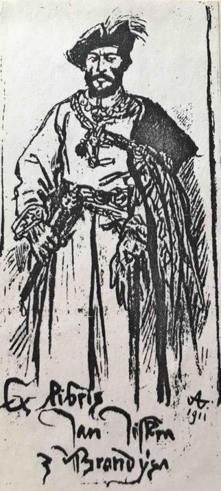 Exlibris von Zdenek Jiskra, 2016